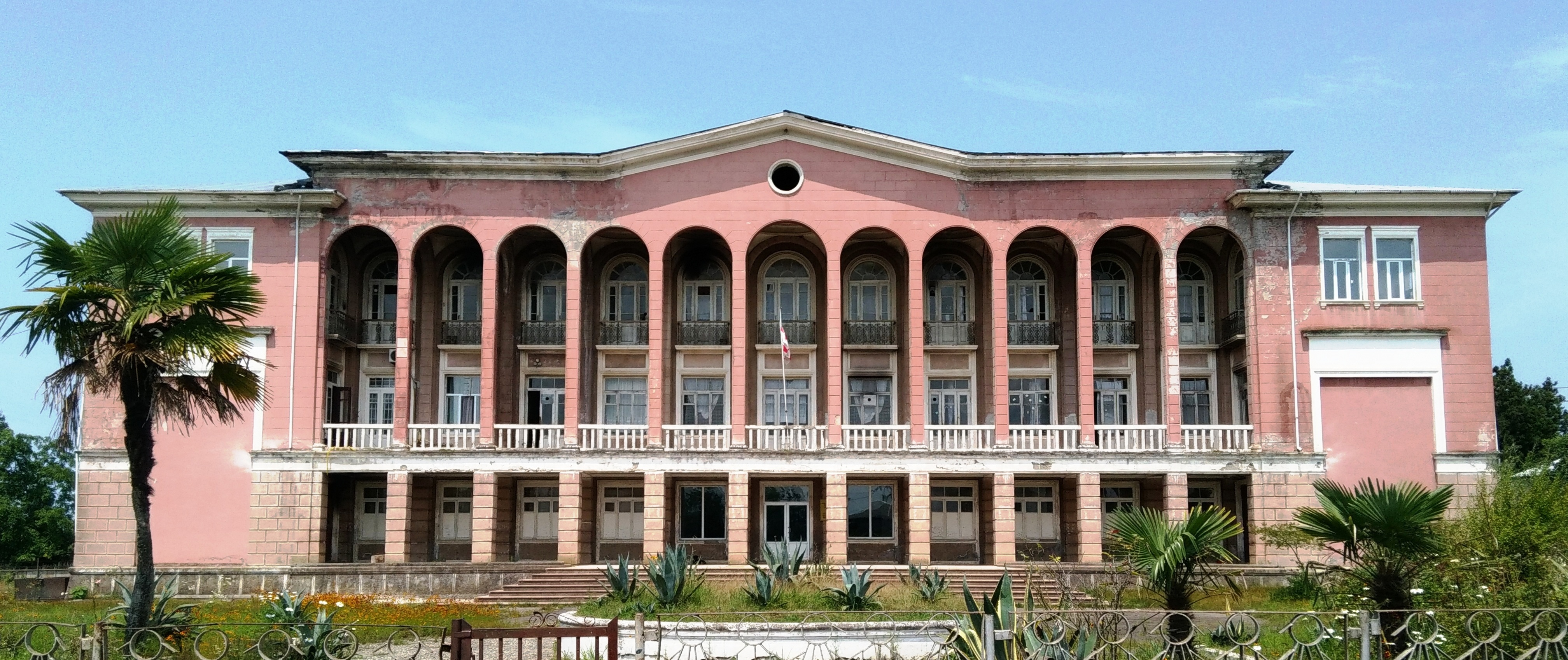 ნატანების სკოლა